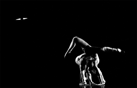 Imagen del Ballet Nacional Chileno (Universidad de Chile)